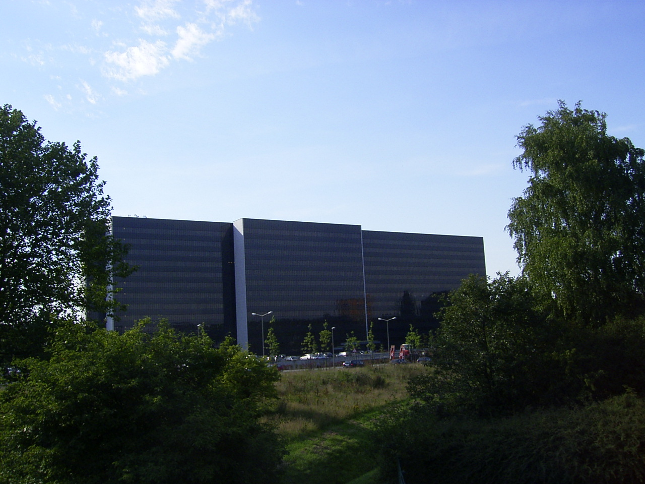 HEW-Zentrale in Winterhude, erbaut von Arne Jacobsen